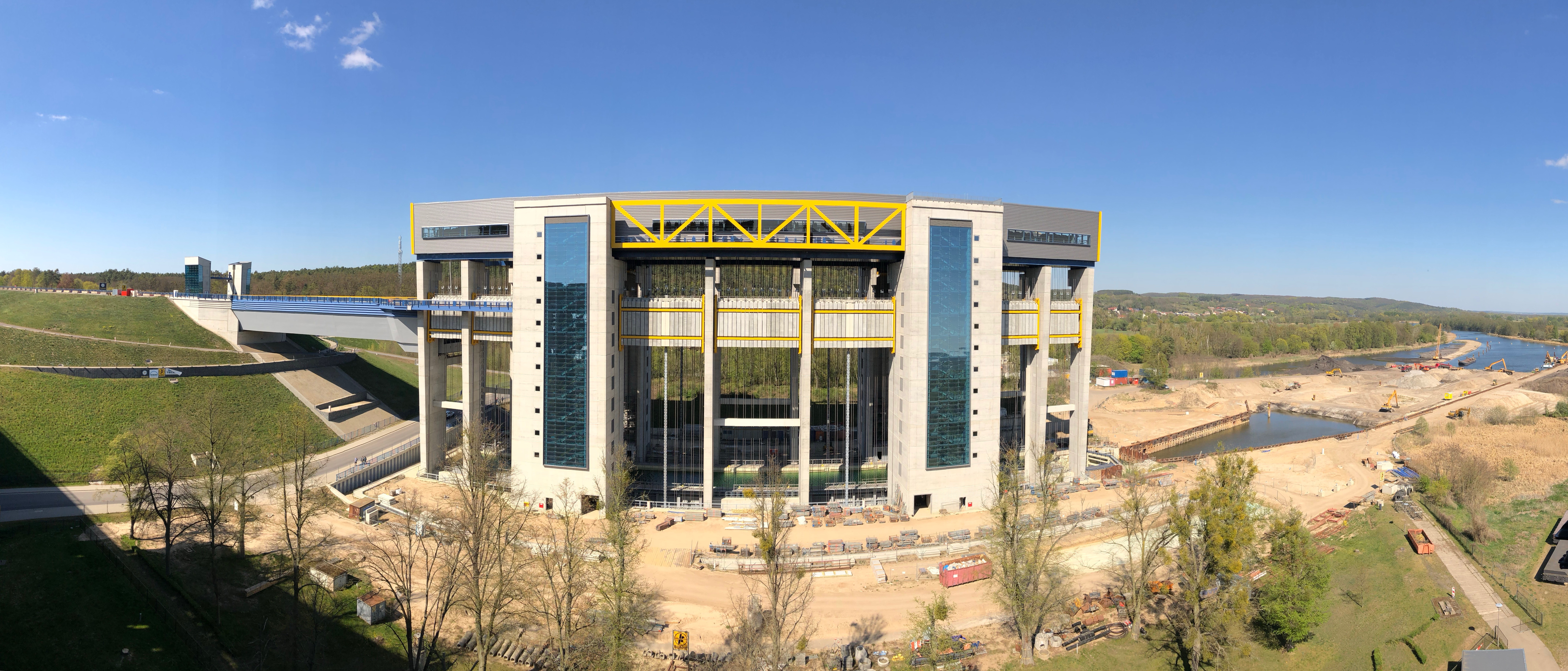 Aufnahme entstand am 22.04.2019 vom alten Schiffshebewerk aus. Neu ist, dass der Trog mit Wassergefüllt ist und die Glaselemente vollständig eingebaut sind. Im Moment ist der Aushub des Unterhafens im Gang.